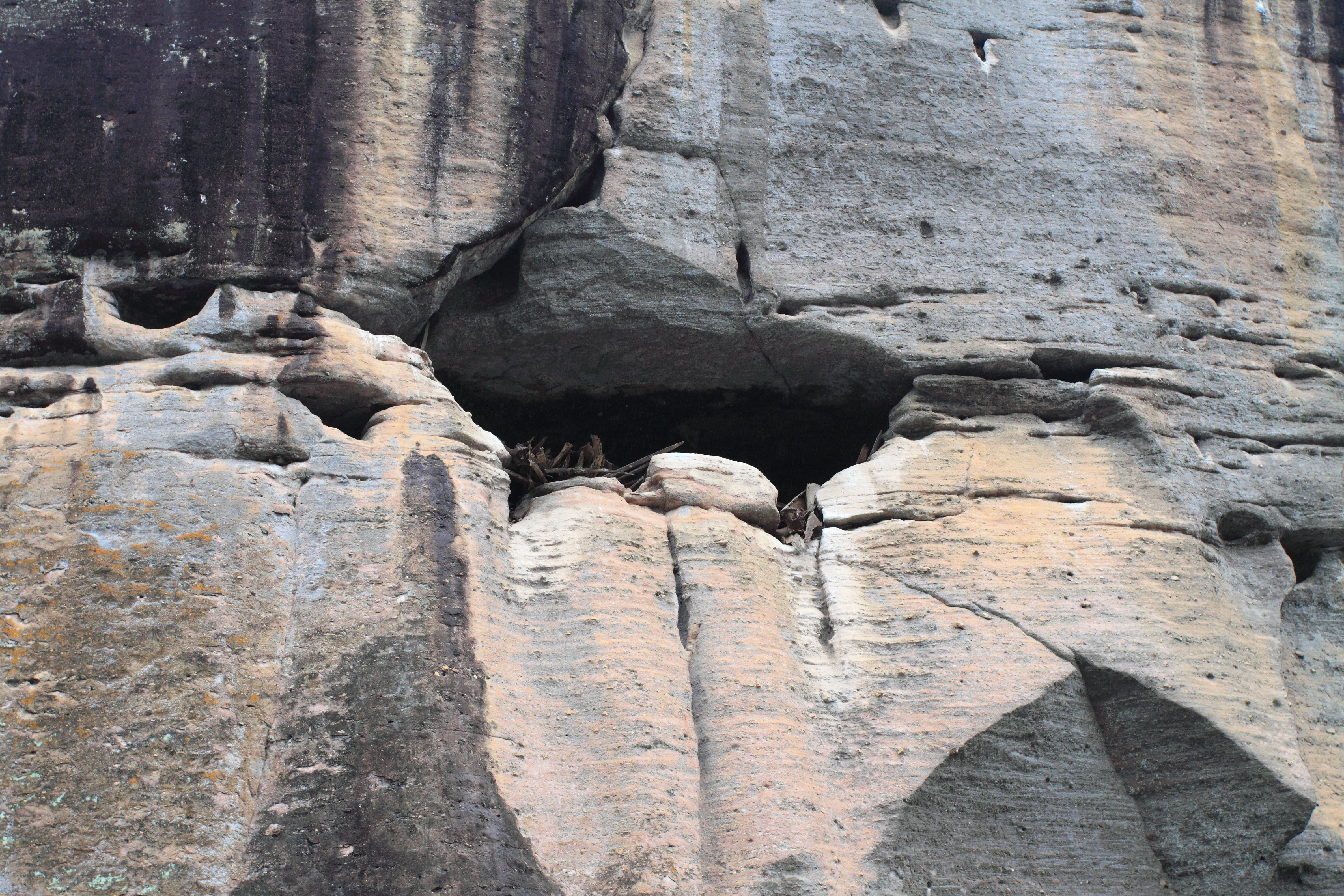 九曲溪——三曲大藏峰（武夷山崖墓）